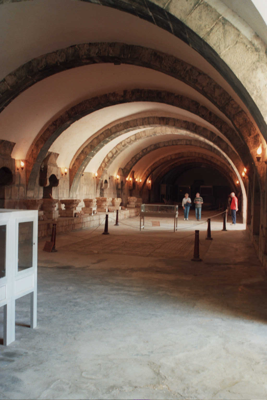 Apamea - Siria Caravanserraglio - ora sede del Museo del Mosaico